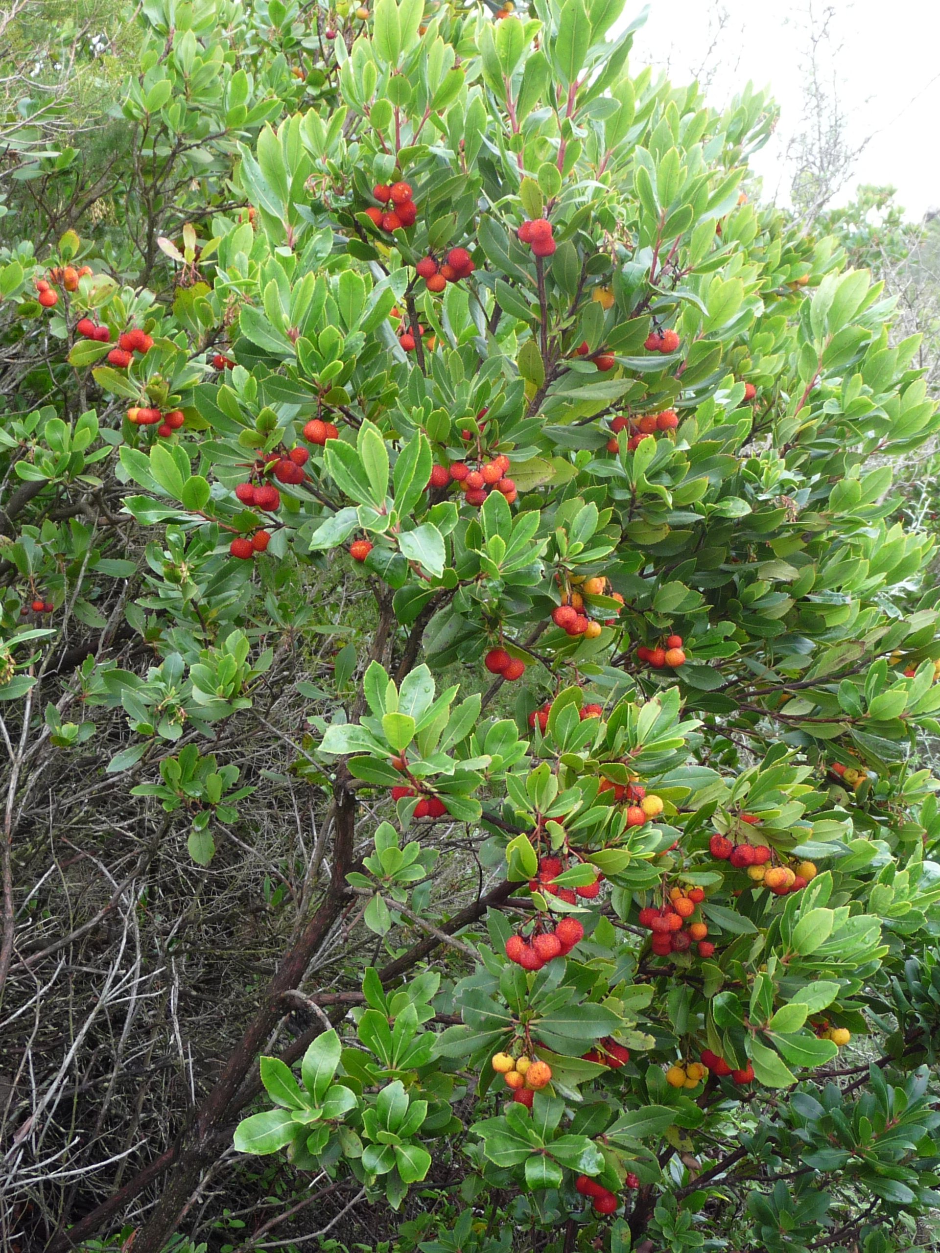 Arbutus unedo, Corsica